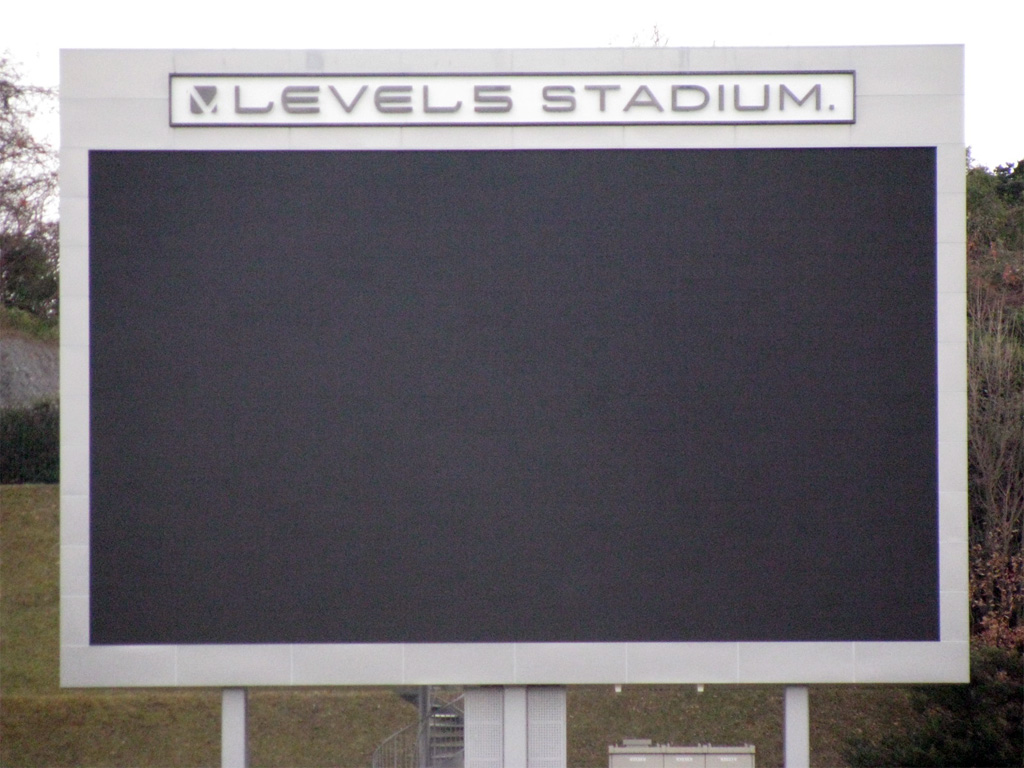 自身がレベスタにて撮影したもの